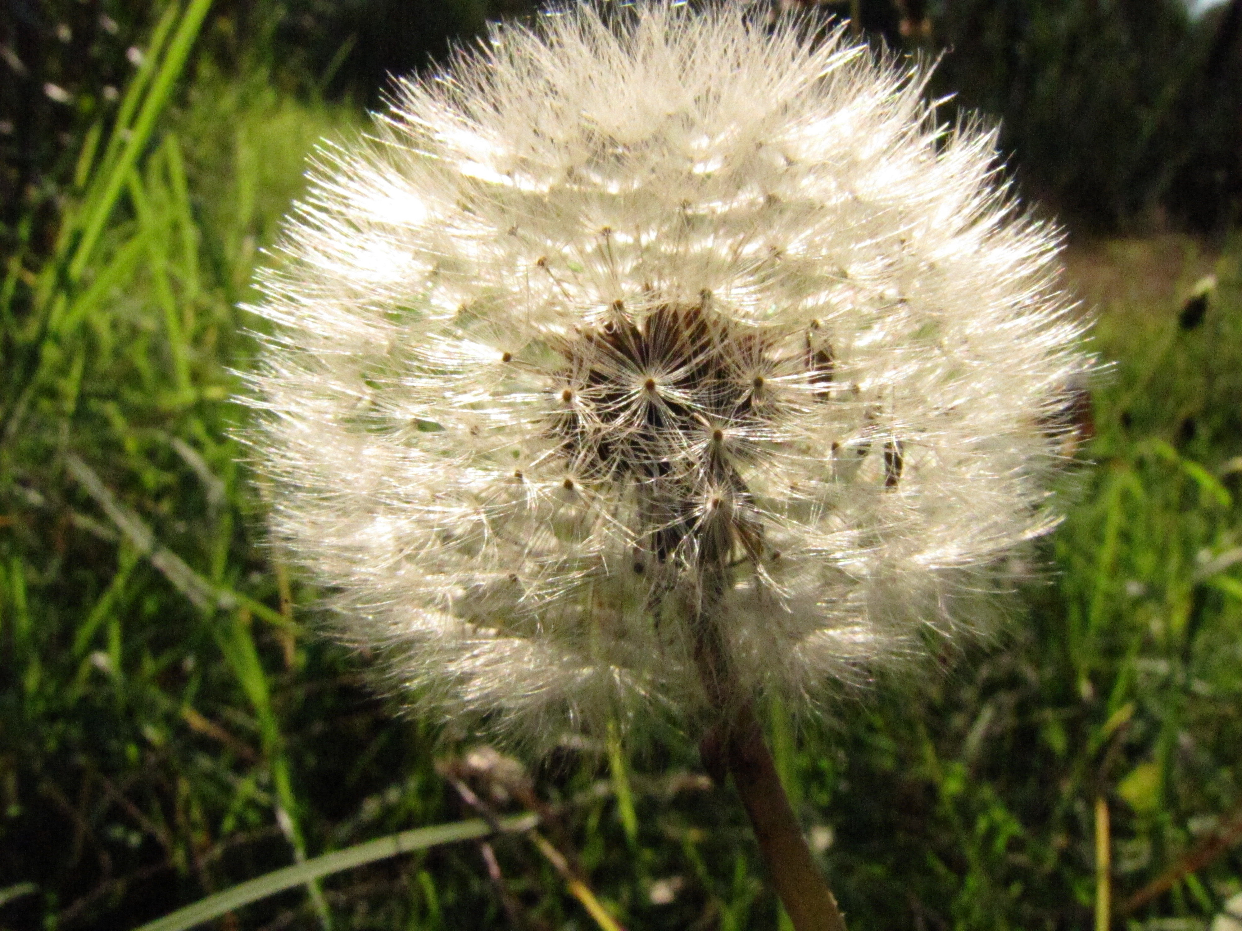 Diente de león (Taraxacum officinale): infrutescencia globosa con vilanos.